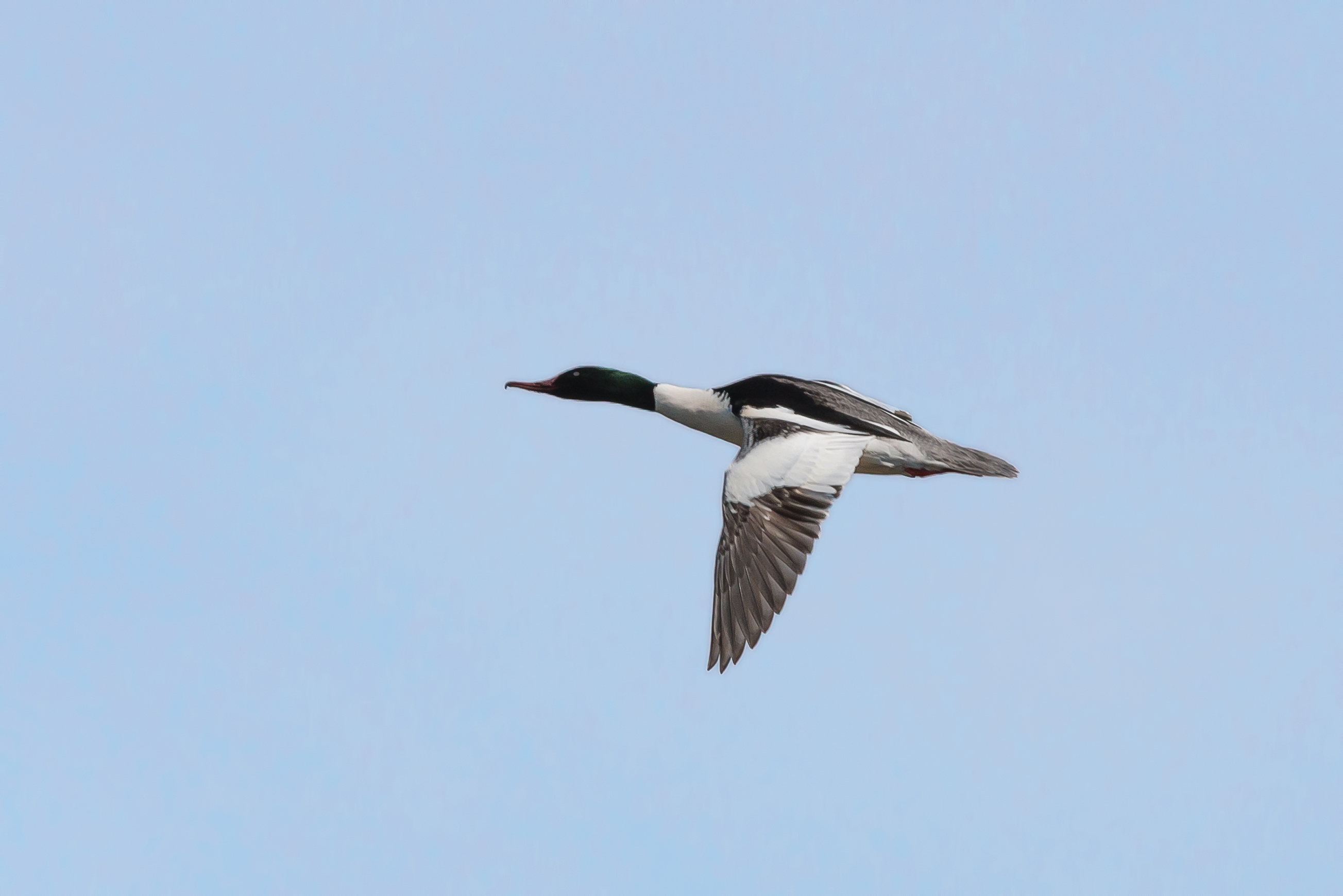 Storskrak, Goosander, Mergus merganser merganser, Vaxholm, Stockholm, Sweden